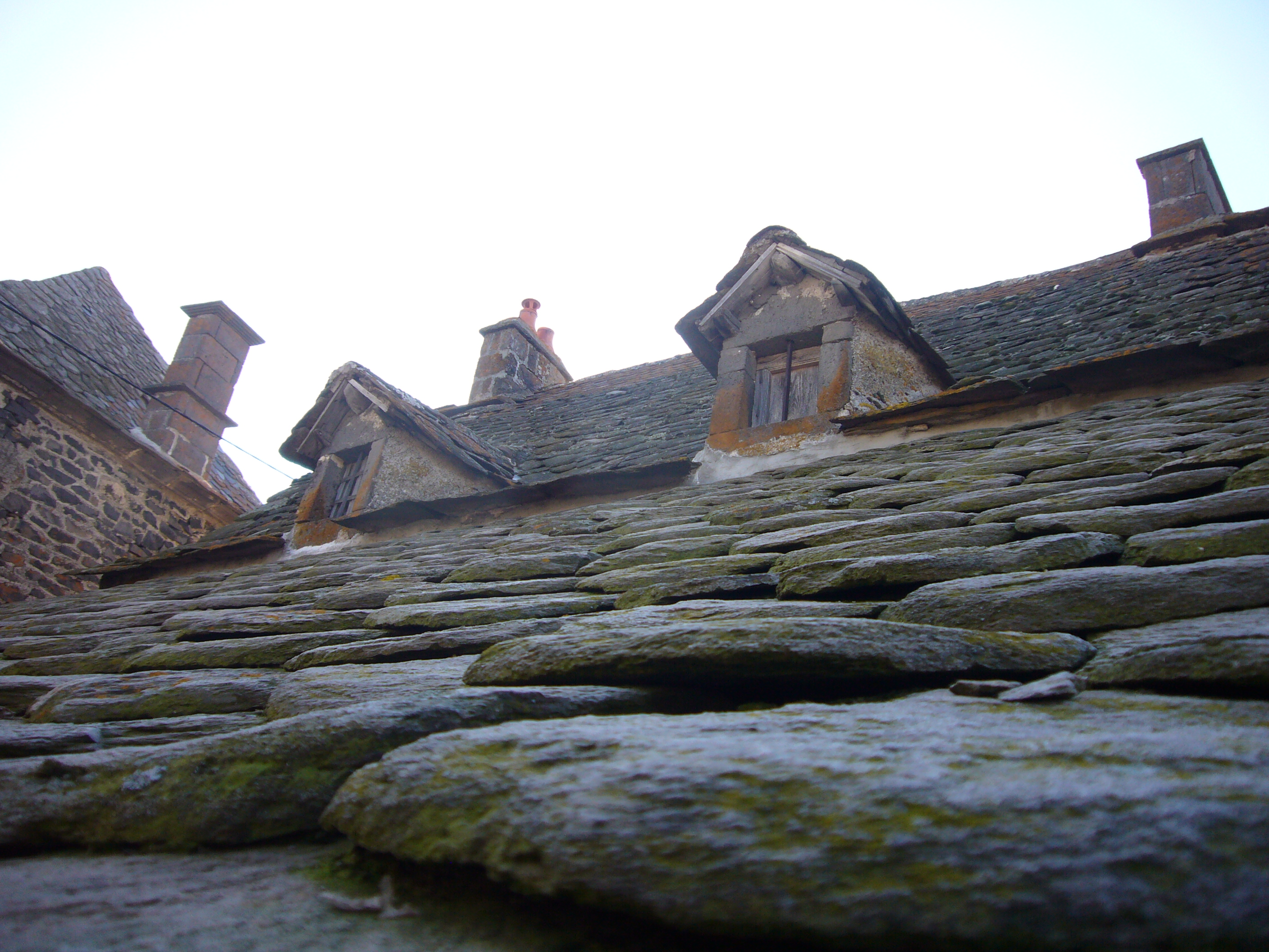 Toiture typique en lauzes, au centre du village.